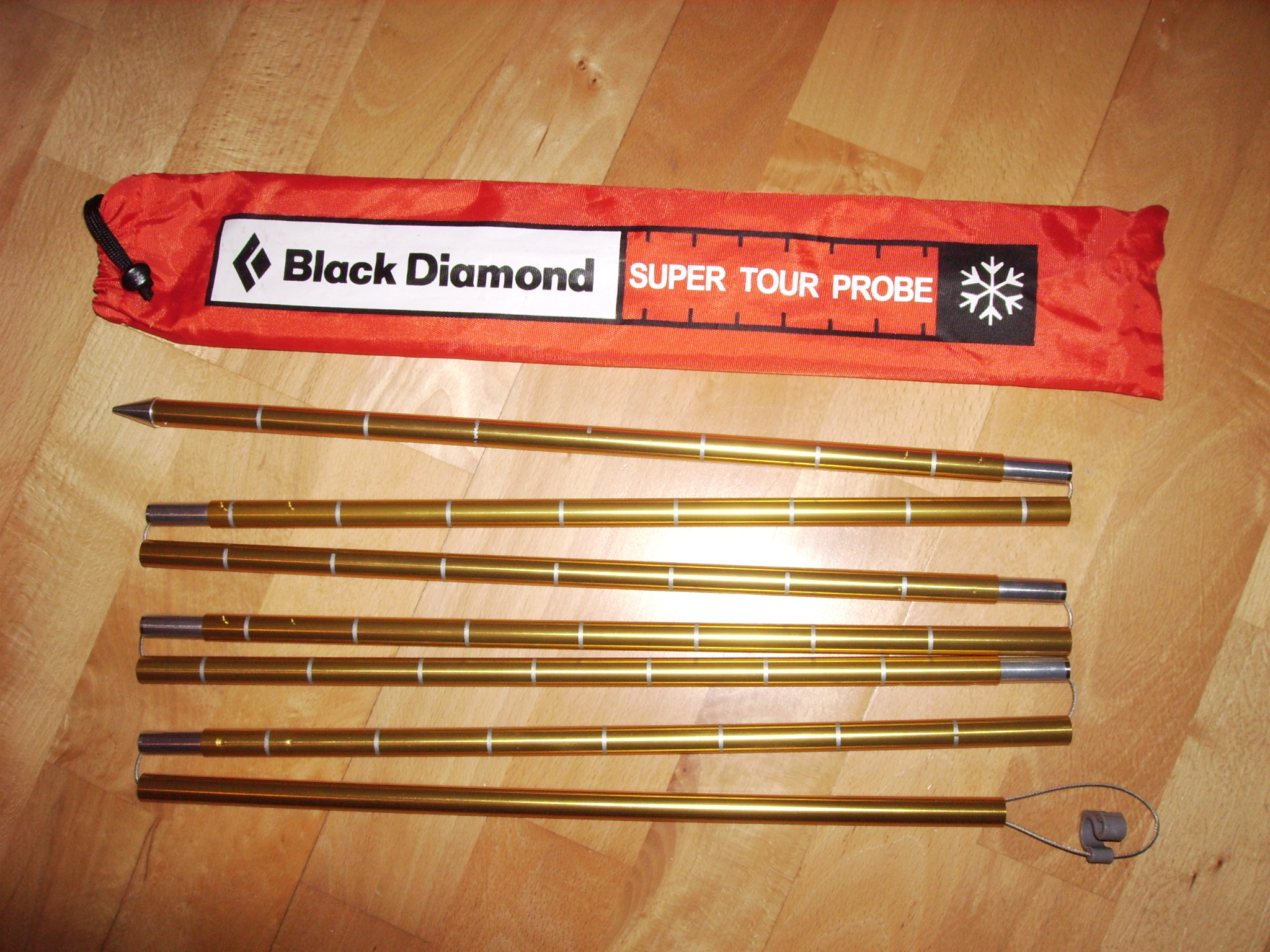 Lawinensonde Avalanche probe